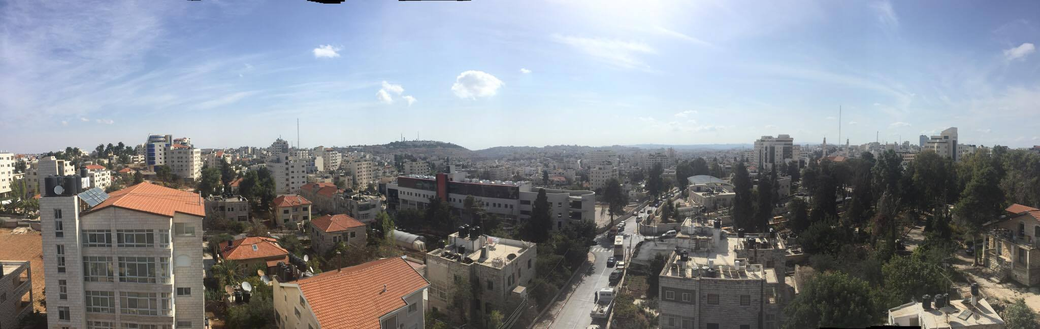 صورة عامة لمدينة البيرة وتظهر فيها مستوطنة بساجوت المقامة على منطقة الجبل الطويل في المدينة